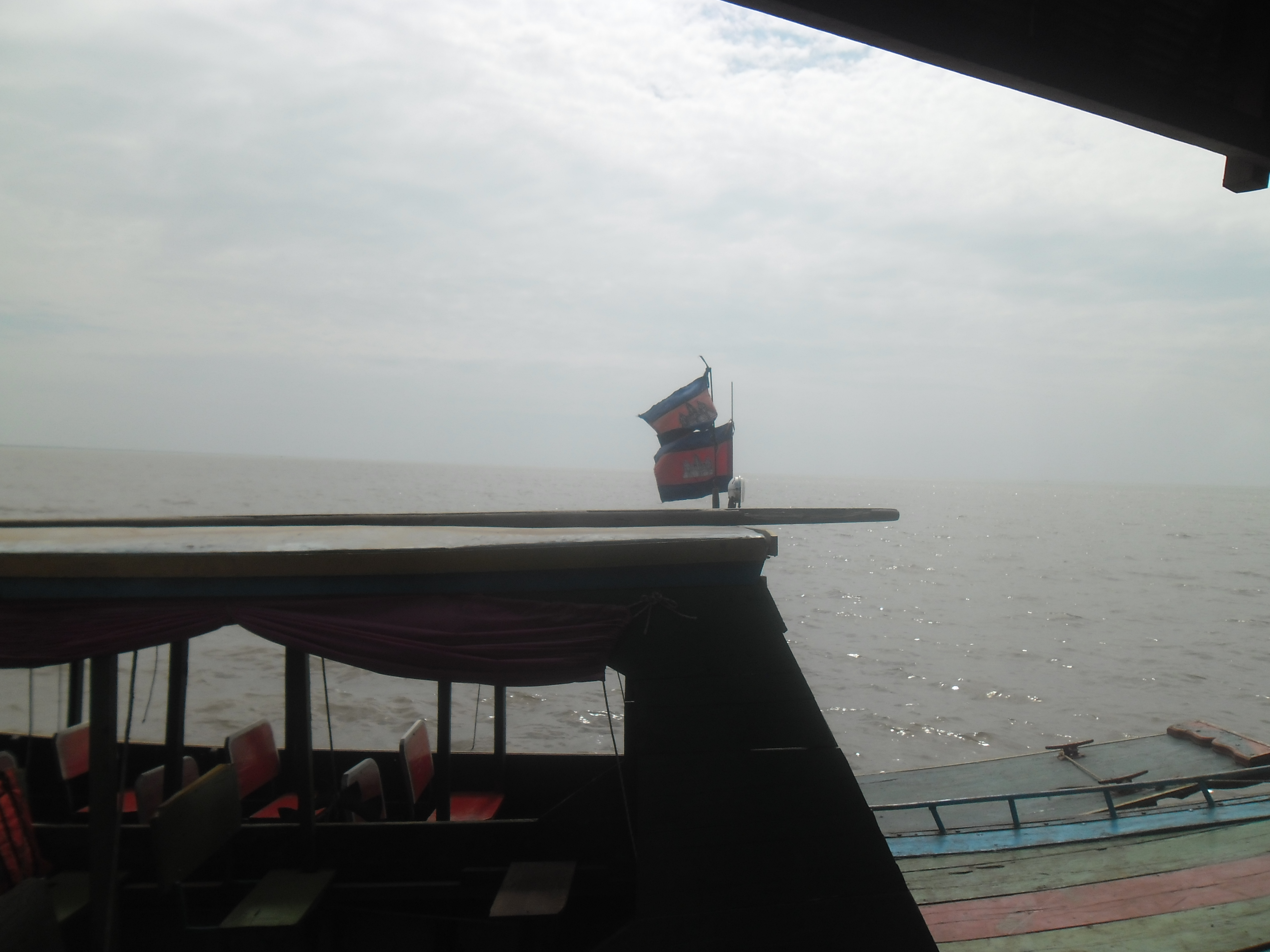 Tonle Sap